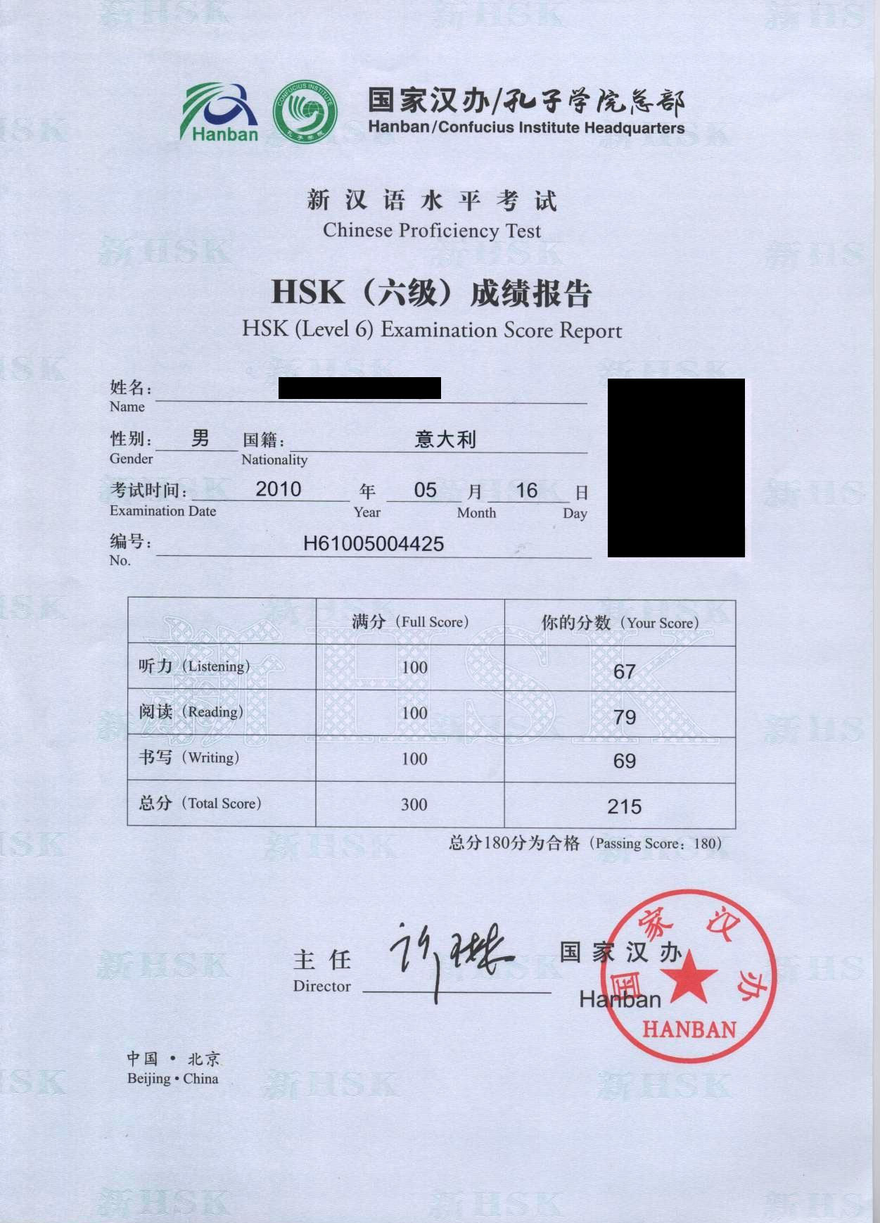 Certificato HSK